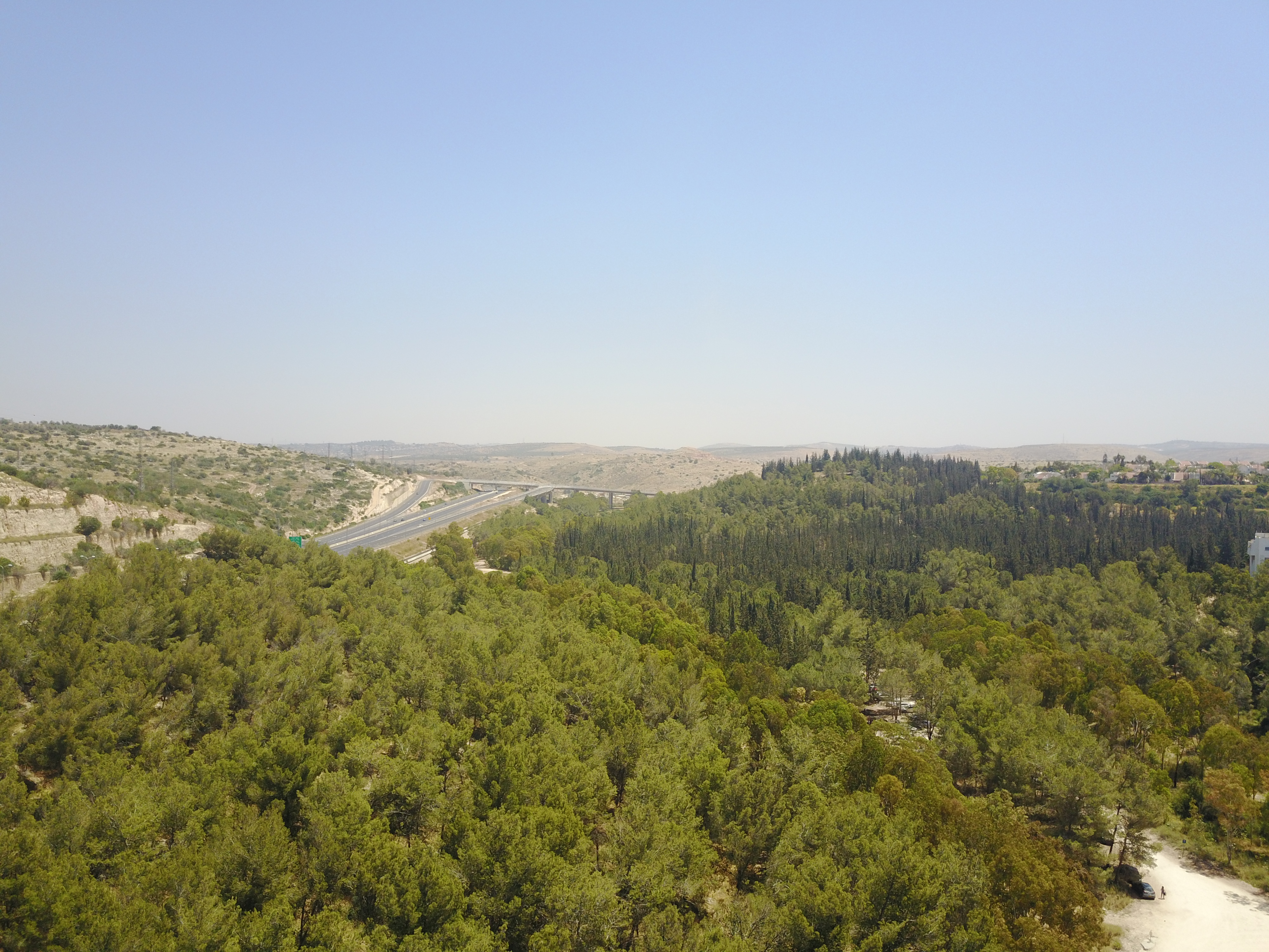 יער ראש העין